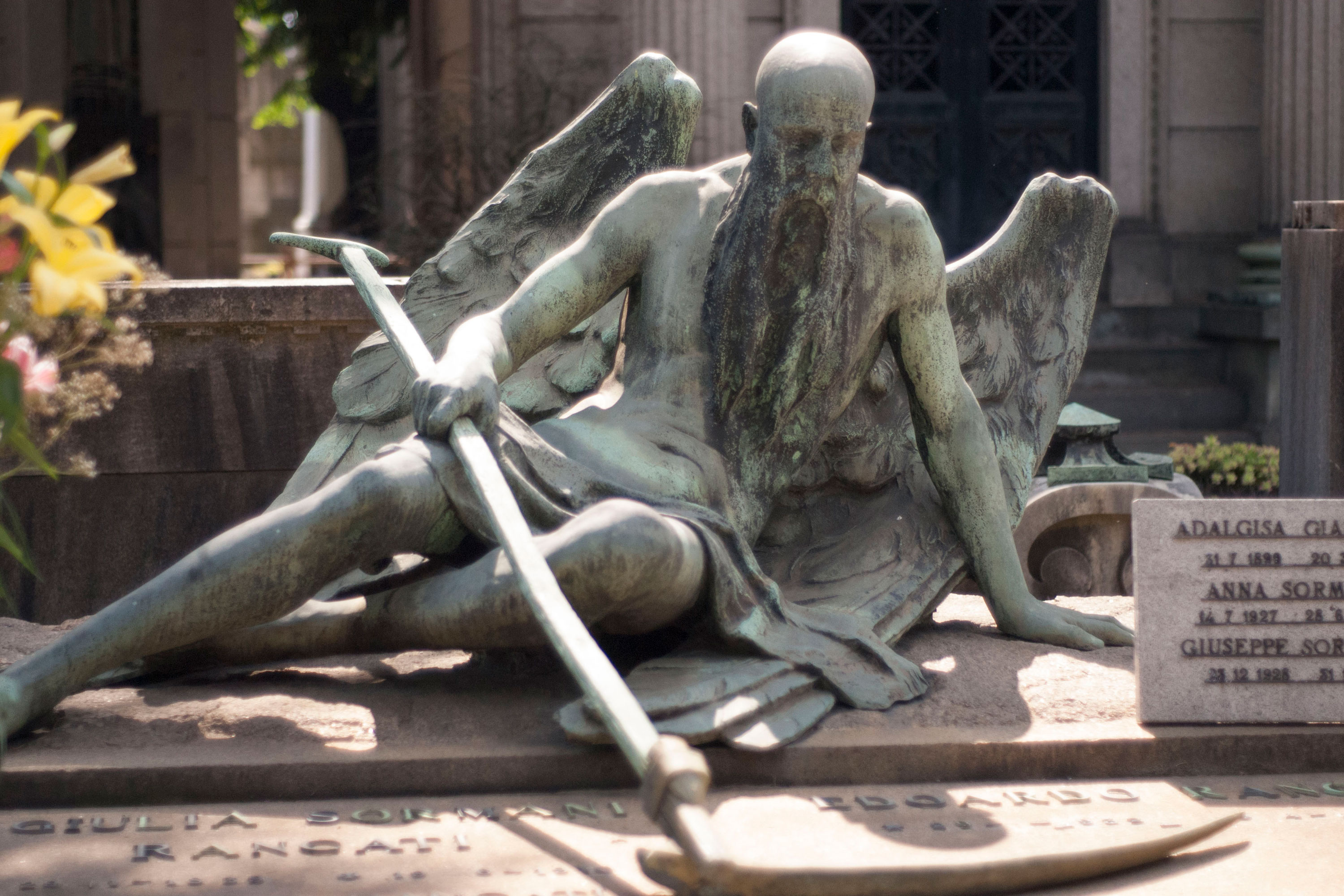 cimitero monumentale di Milano This is a photo of a monument which is part of cultural heritage of Italy.